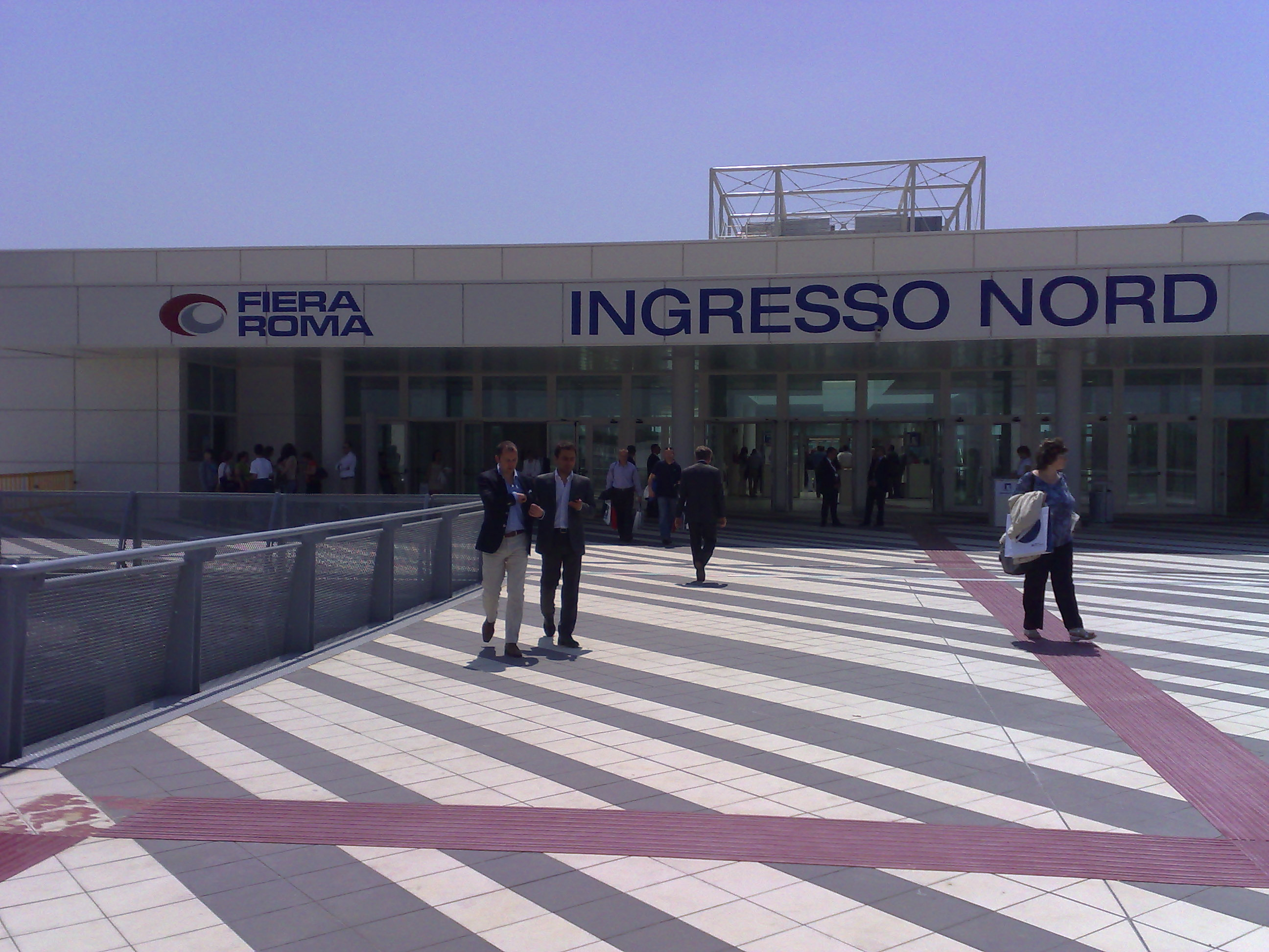 Nuova Fiera di Roma, Ingresso Nord, cameraphone upload by ShoZu